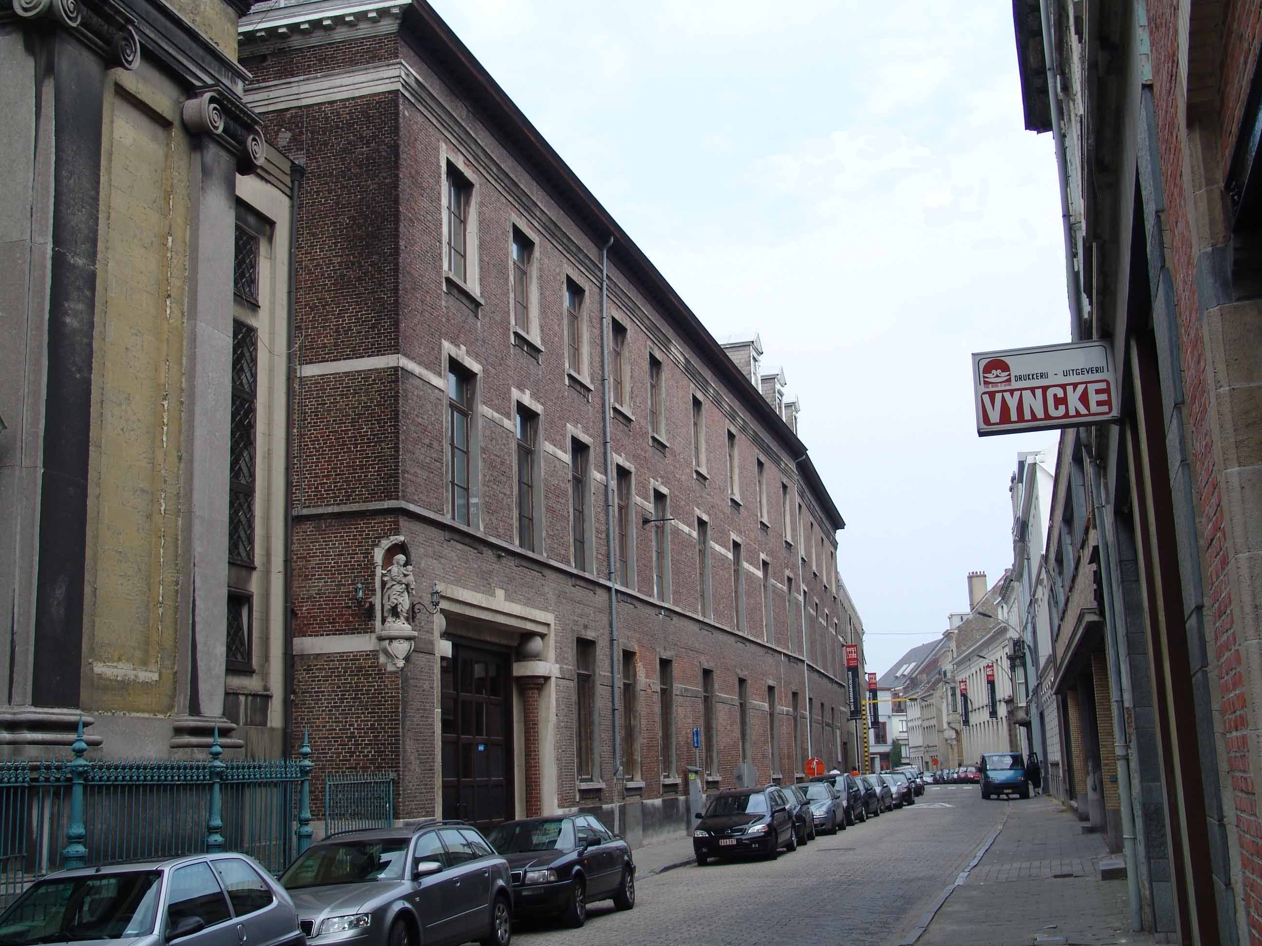 België, Gent, Sint-Barbaracollege Licensing categorie:afbeelding Gent